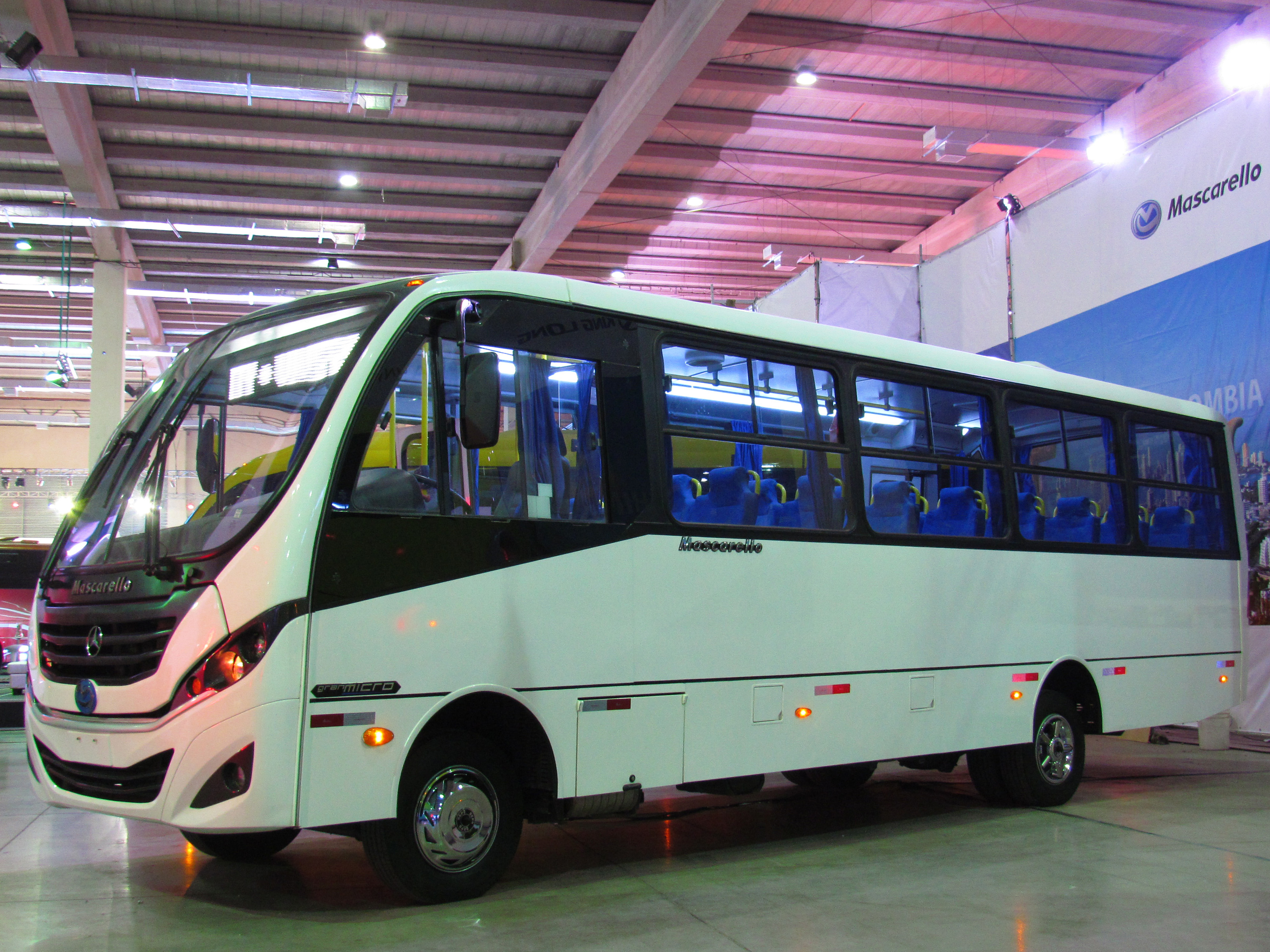 Brazilian bus maker